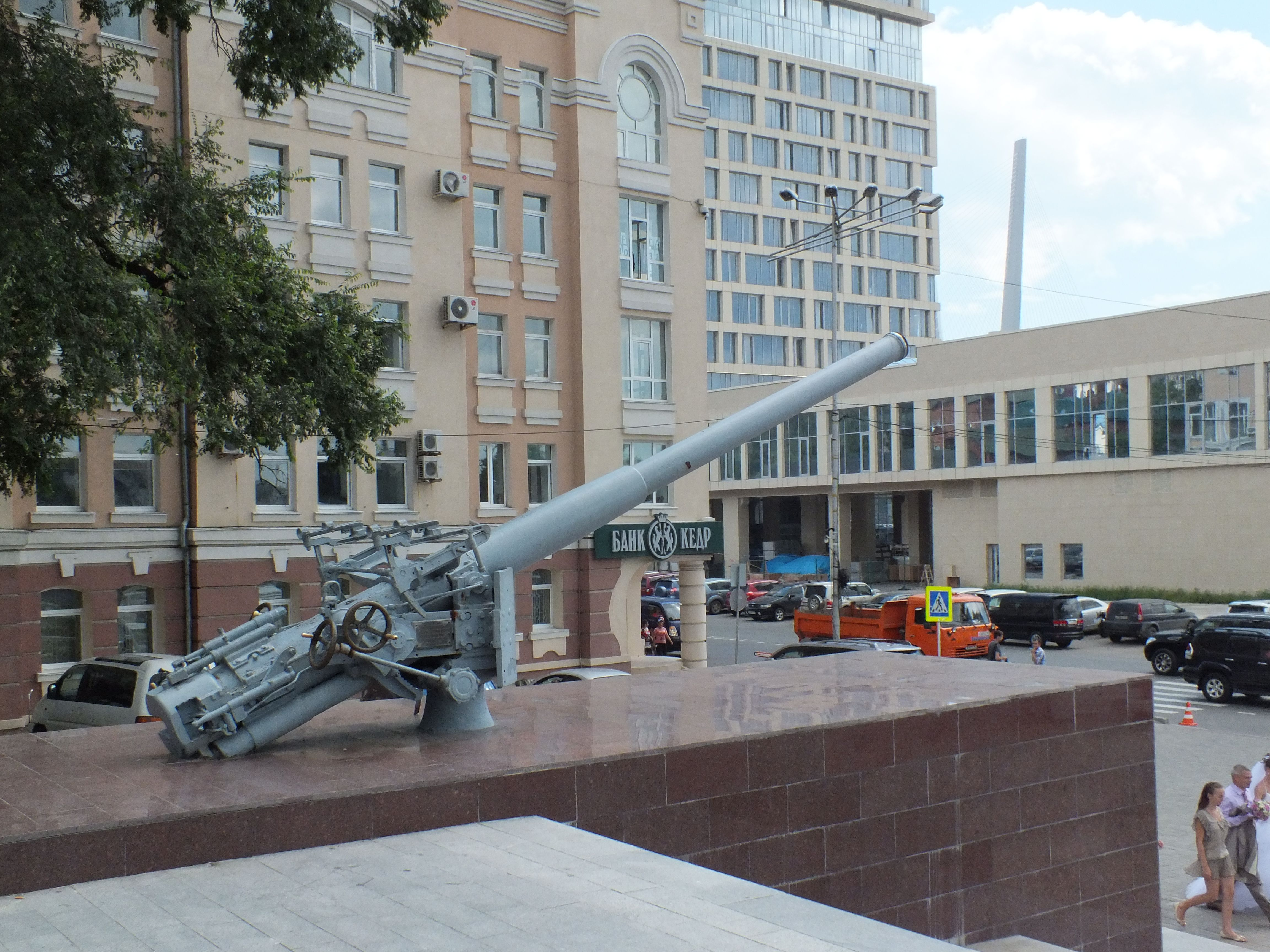 Башня от бронекатера у подводной лодки С-56